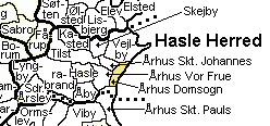 Århus Domsogn , Hasle Herred, Århus Amt